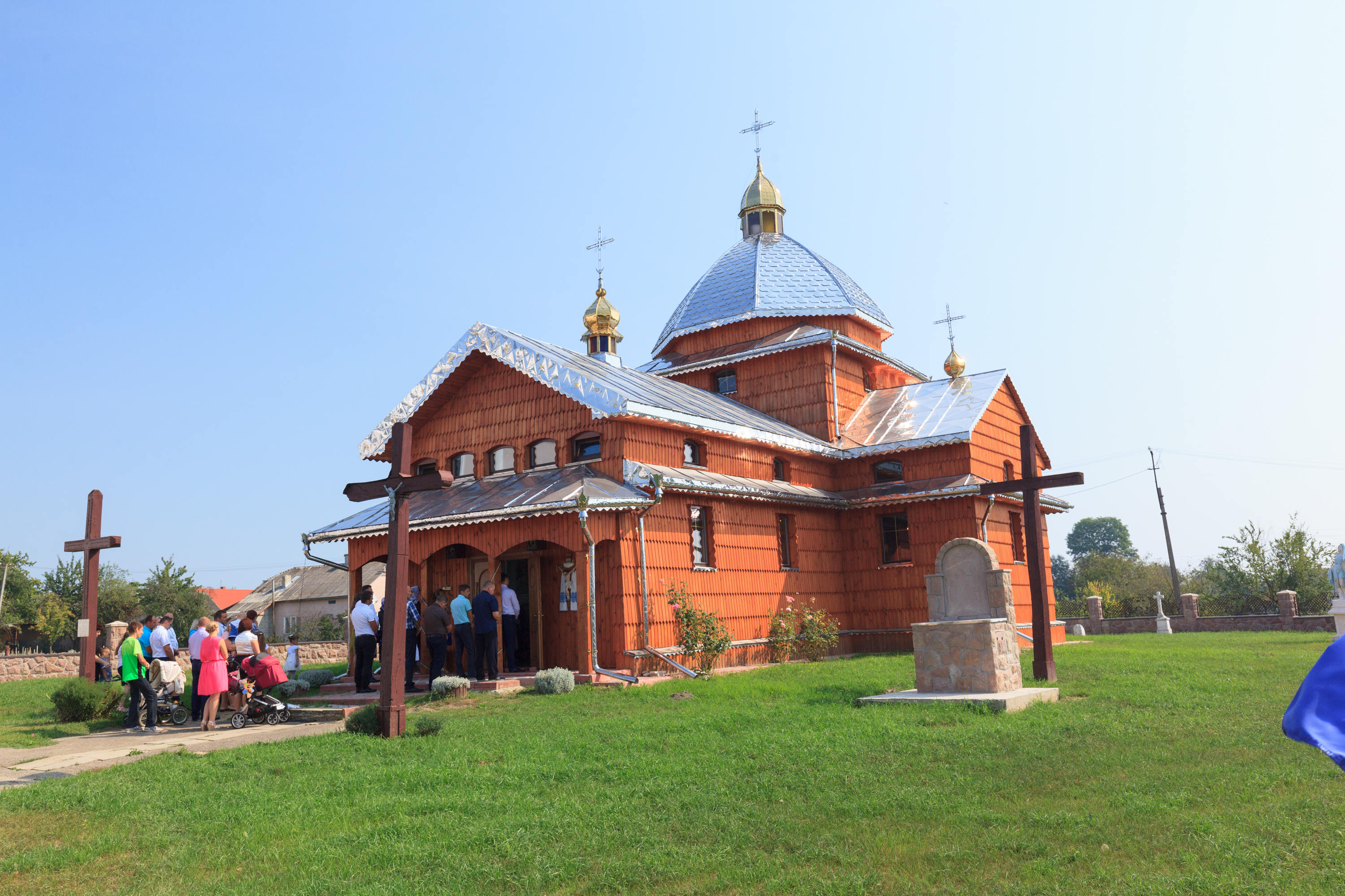 Церква Св.пр.Іллі, с.Сарни